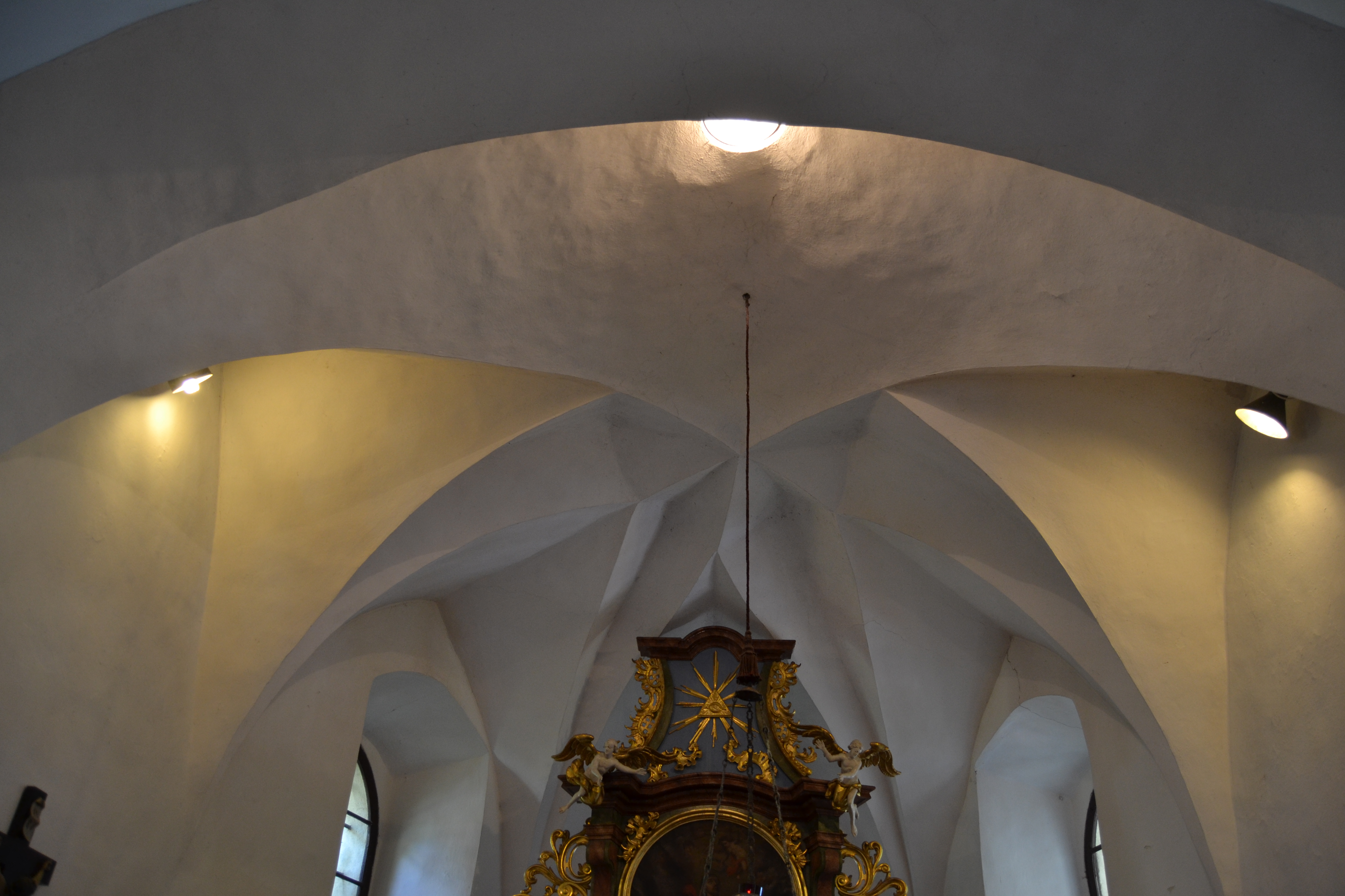 klenba